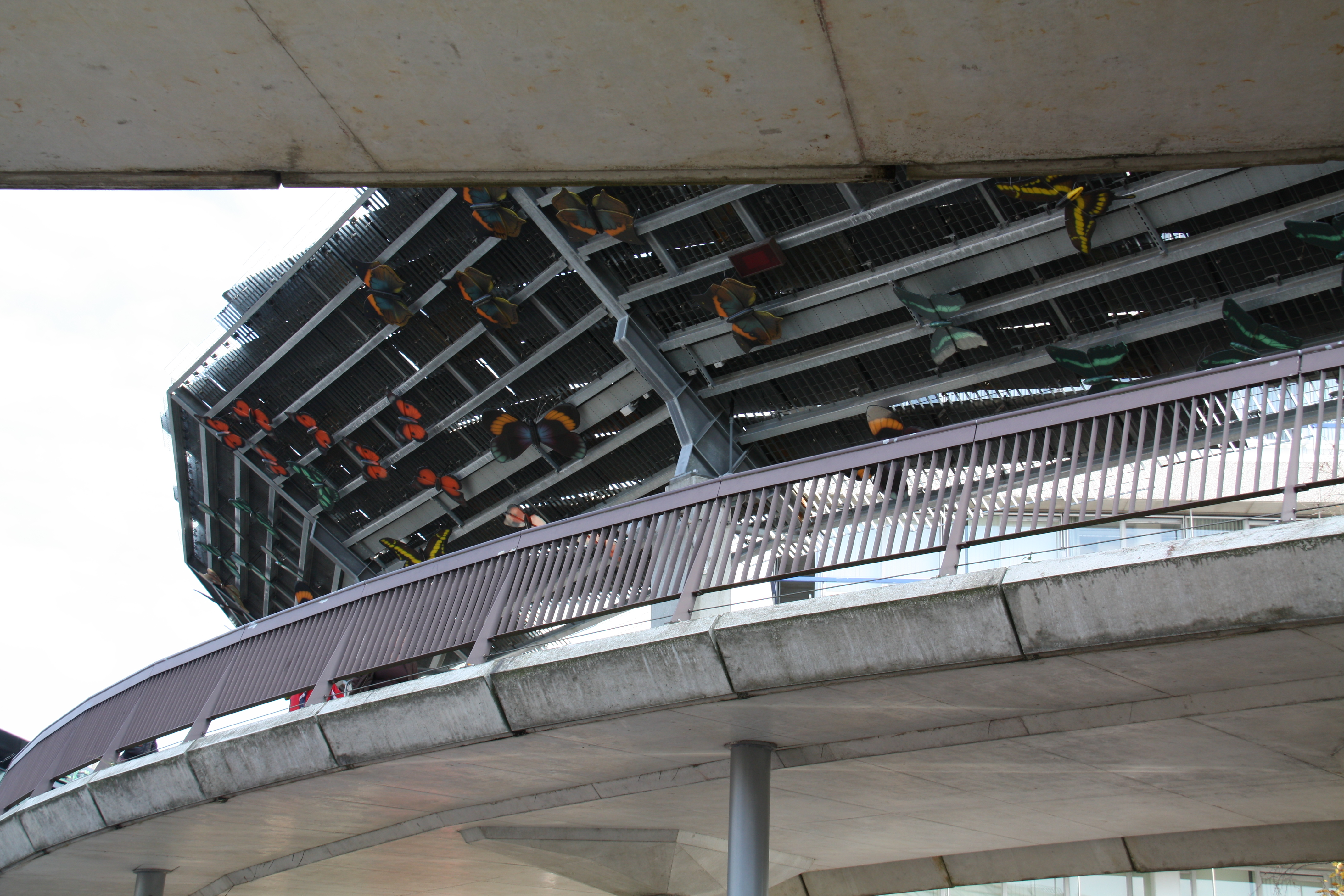 De loopbrug tussen het oude en nieuwe gedeelte van het Dierenpark Emmen